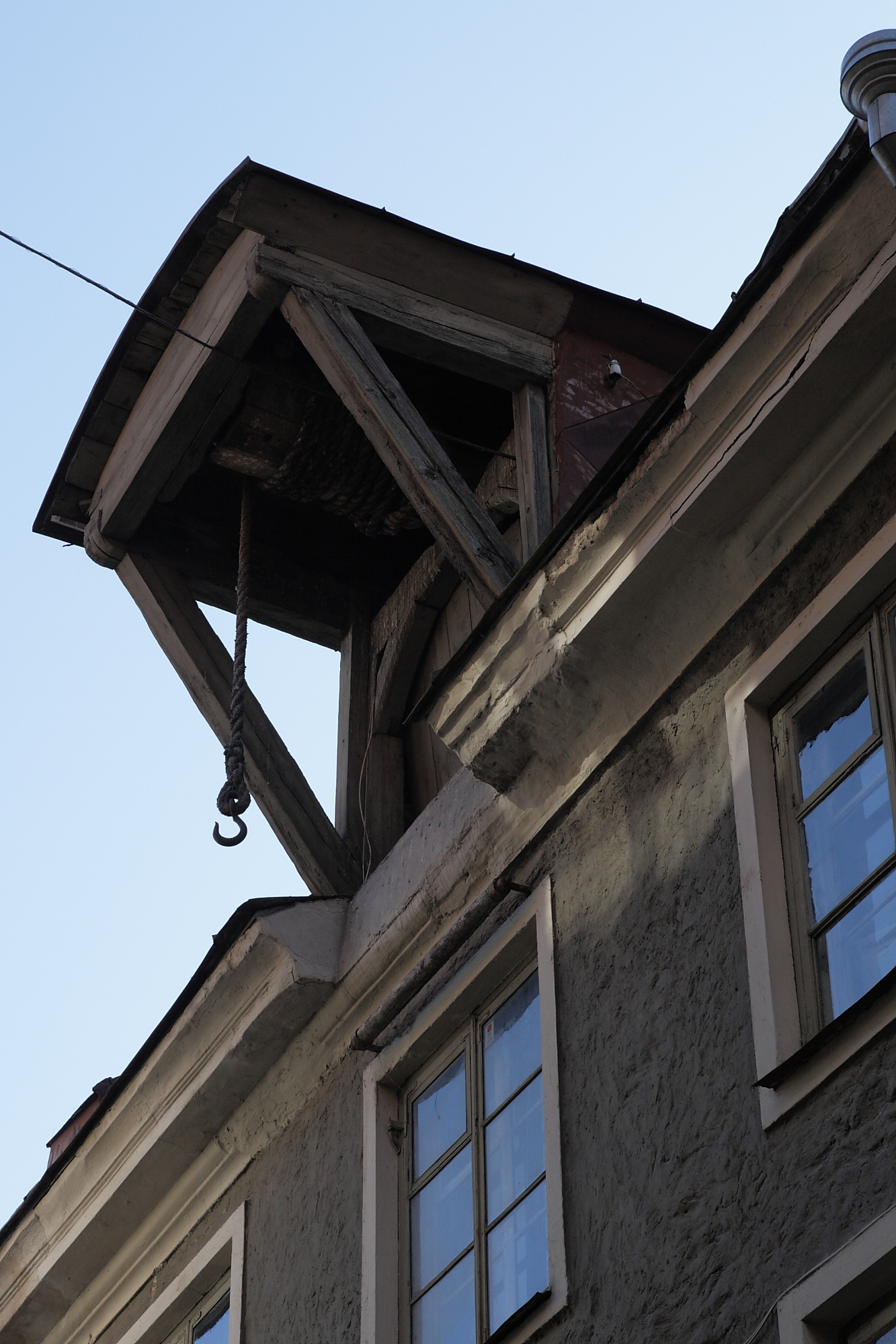 Tallinn, elamu Sauna 8, 15.-19.saj